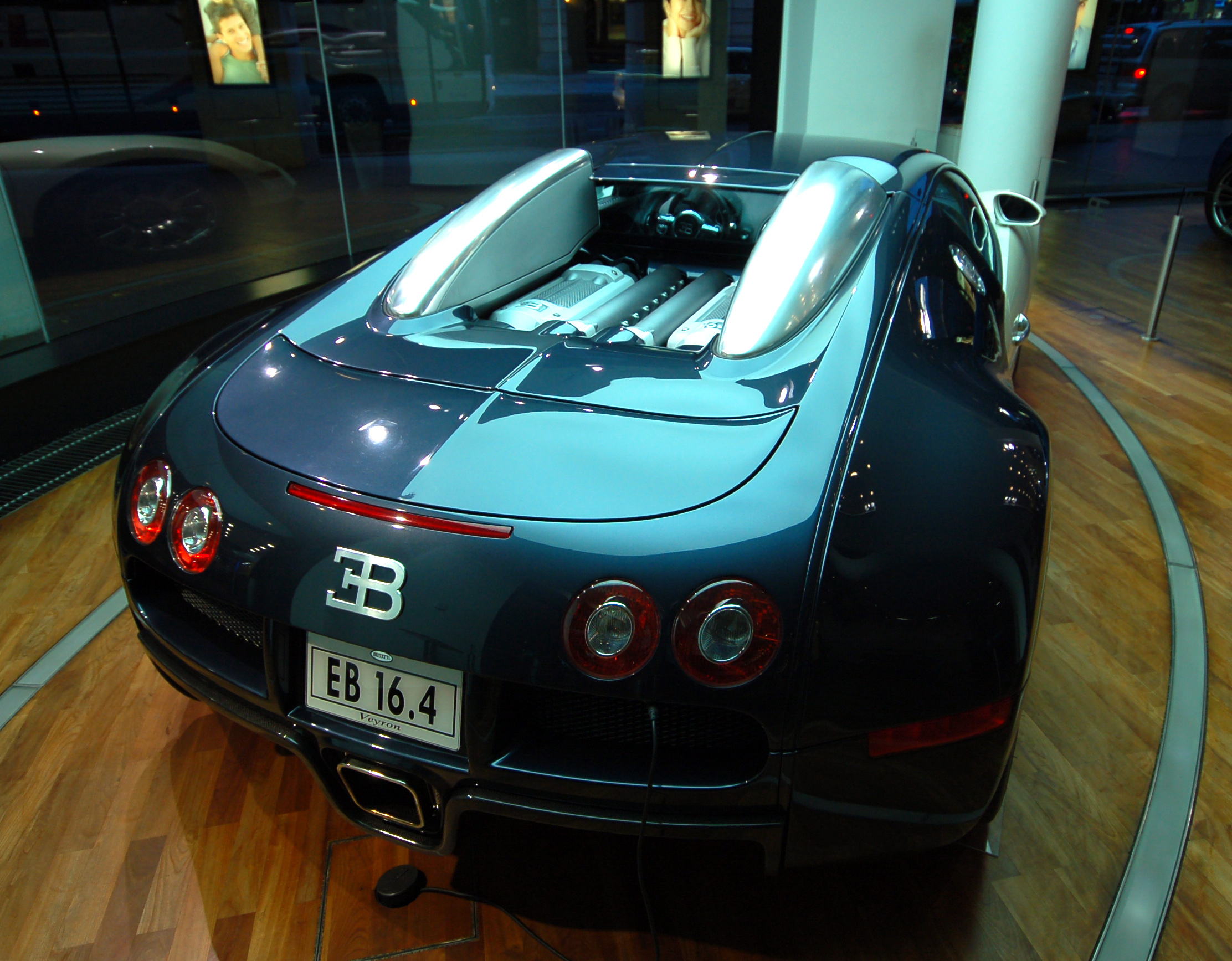 VW- Pavillon Berlin Friedrichstraße